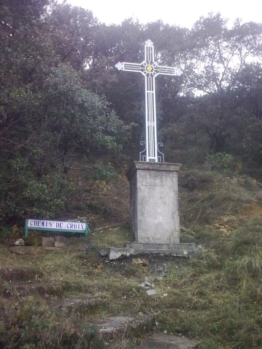 Vue sur la curiosité de Laval : son chemin de croix qui se situe dans la garrigue